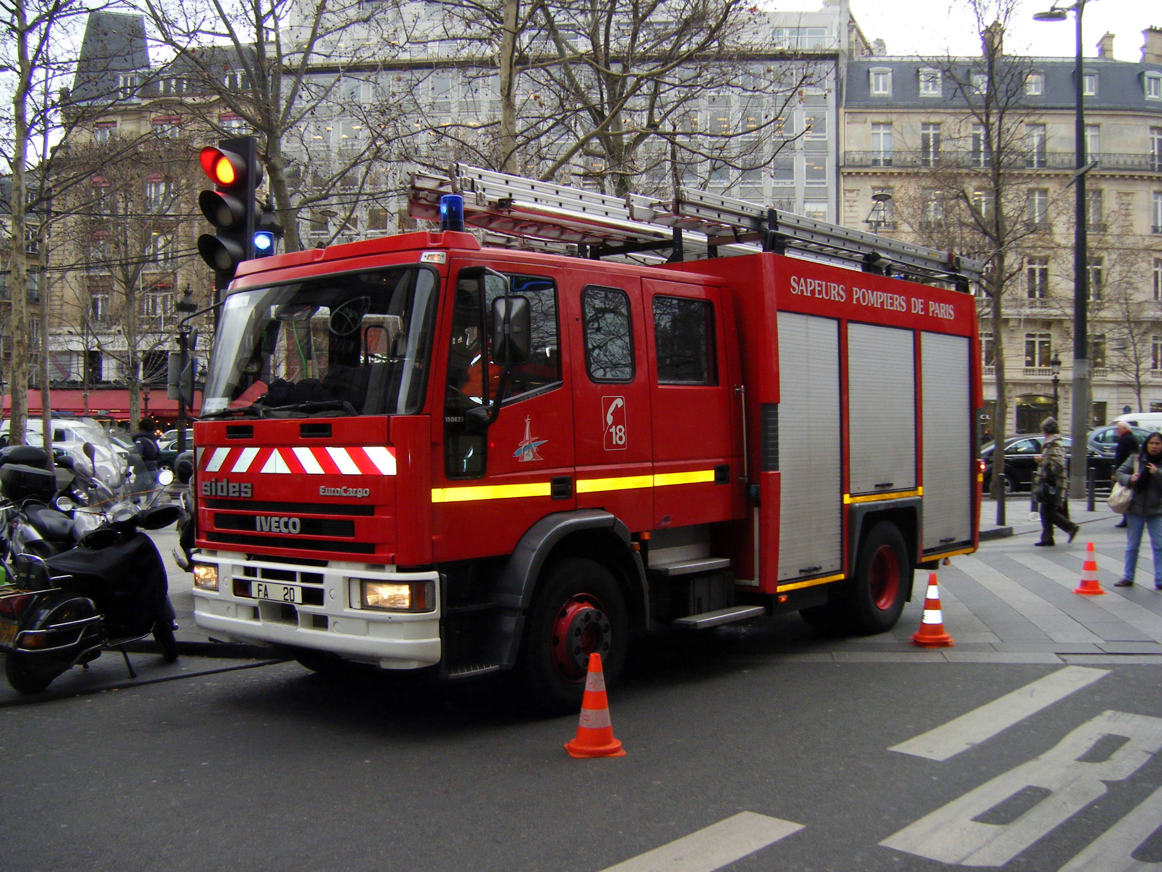 IVECO EuroCargo Sides camion à Pompiers à Paris.